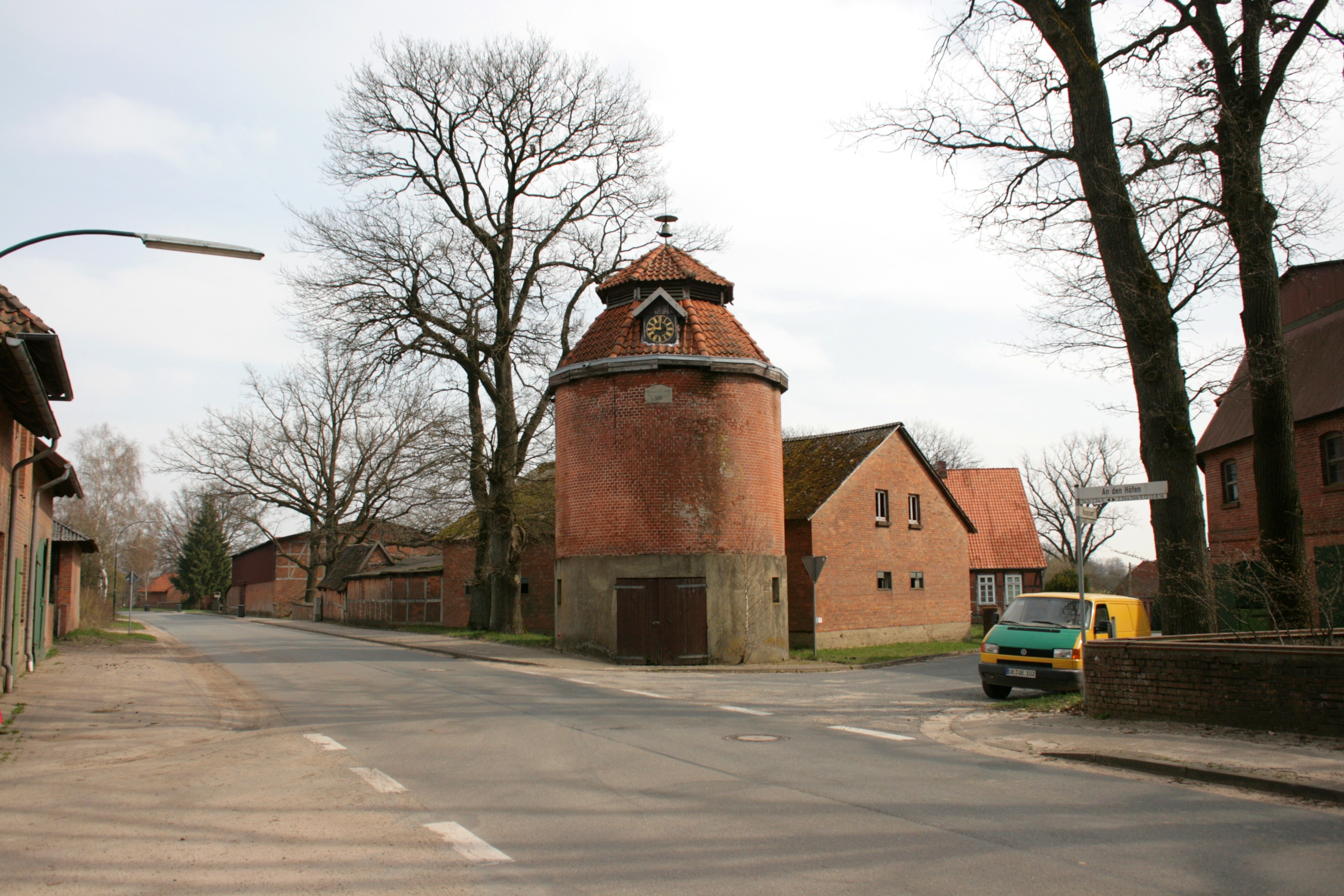 Wasserturm auf der Ecke „In den Höfen“ / „Wassertum“ in Vinstedt, Natendorf